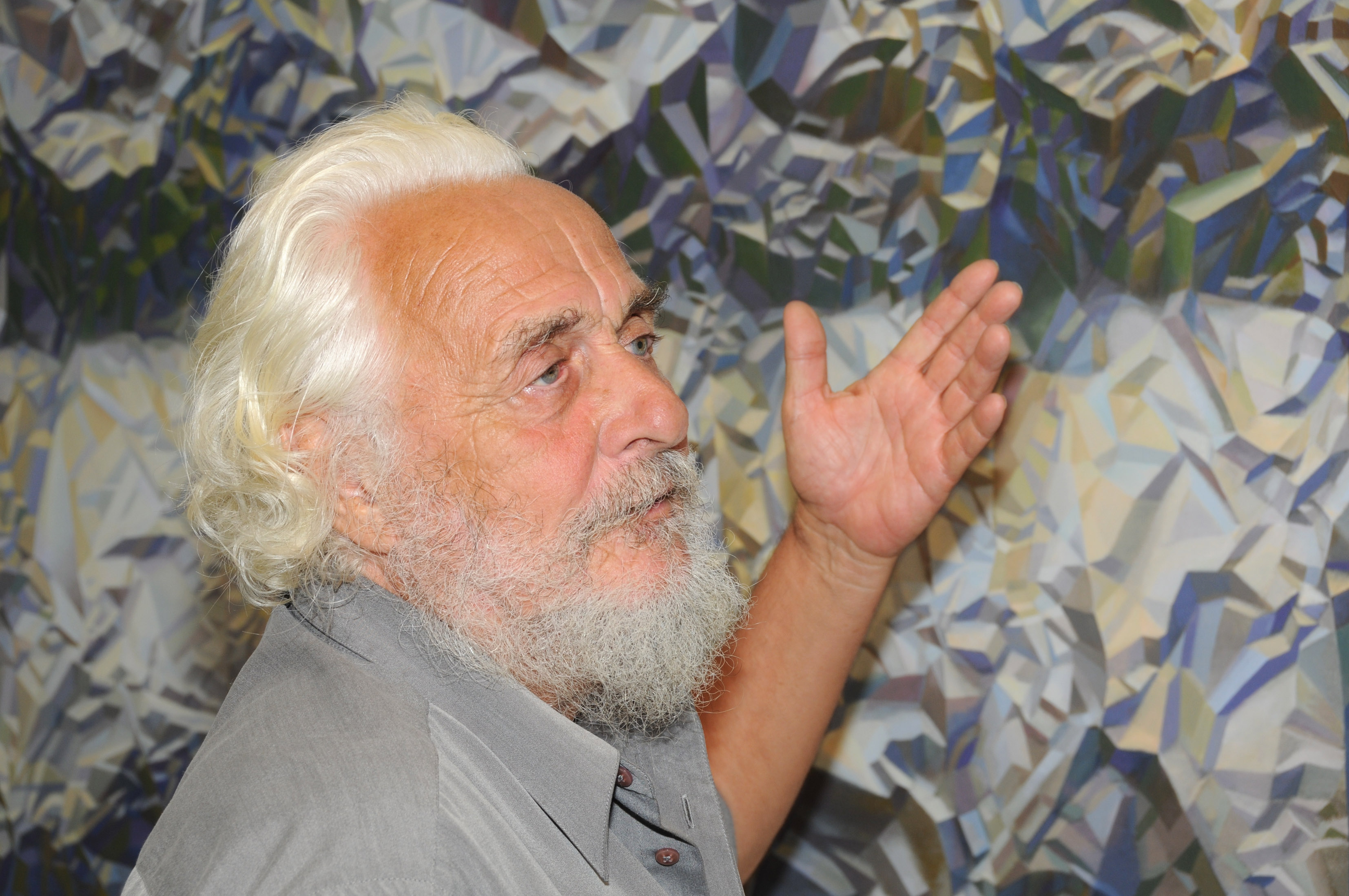 Portrait Joachim Hiller